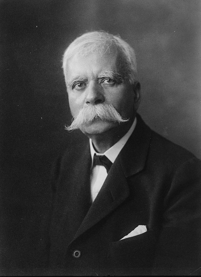 El político griego Alexandros Zaimis